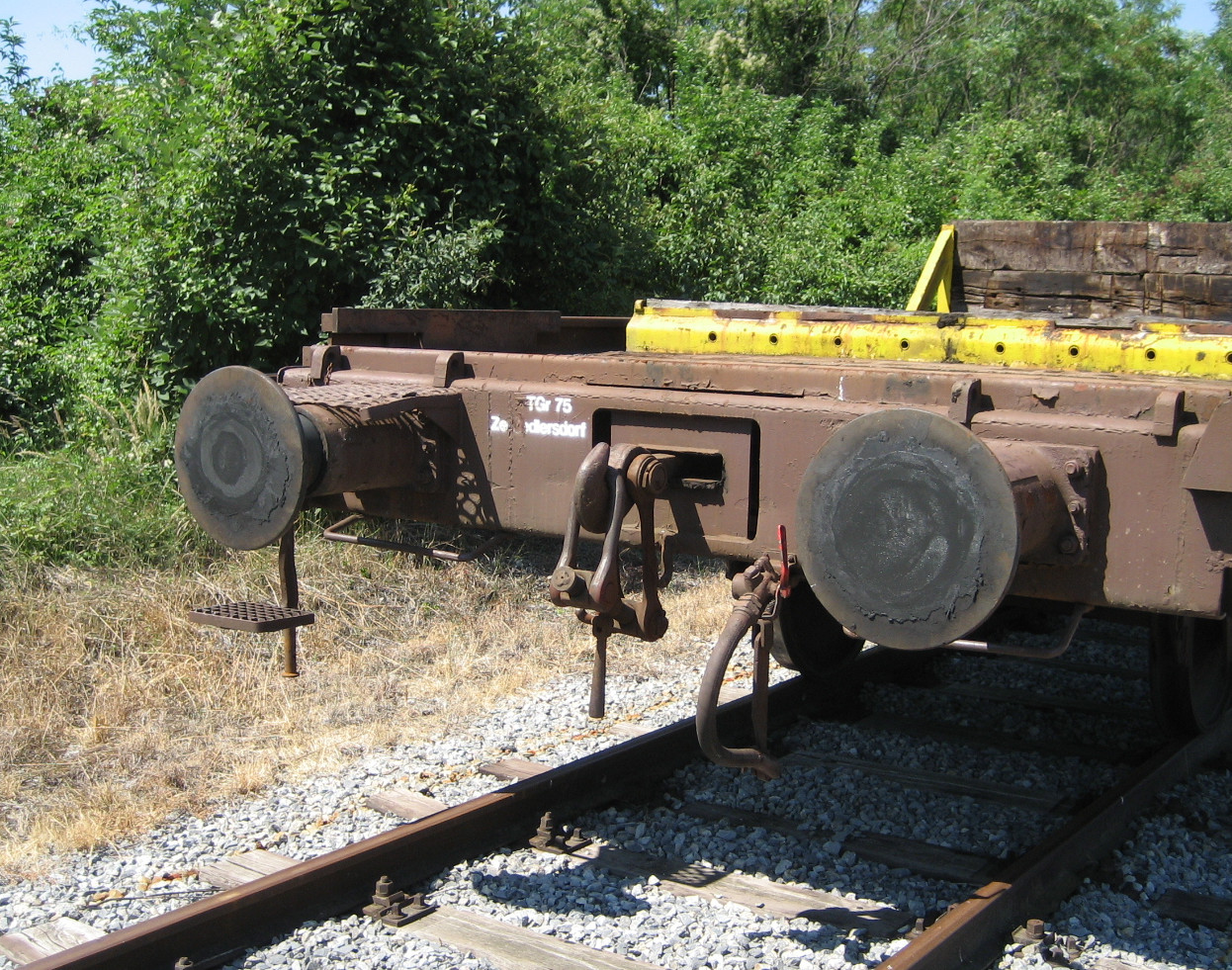 Seitenpuffer eines Bahnwaggons